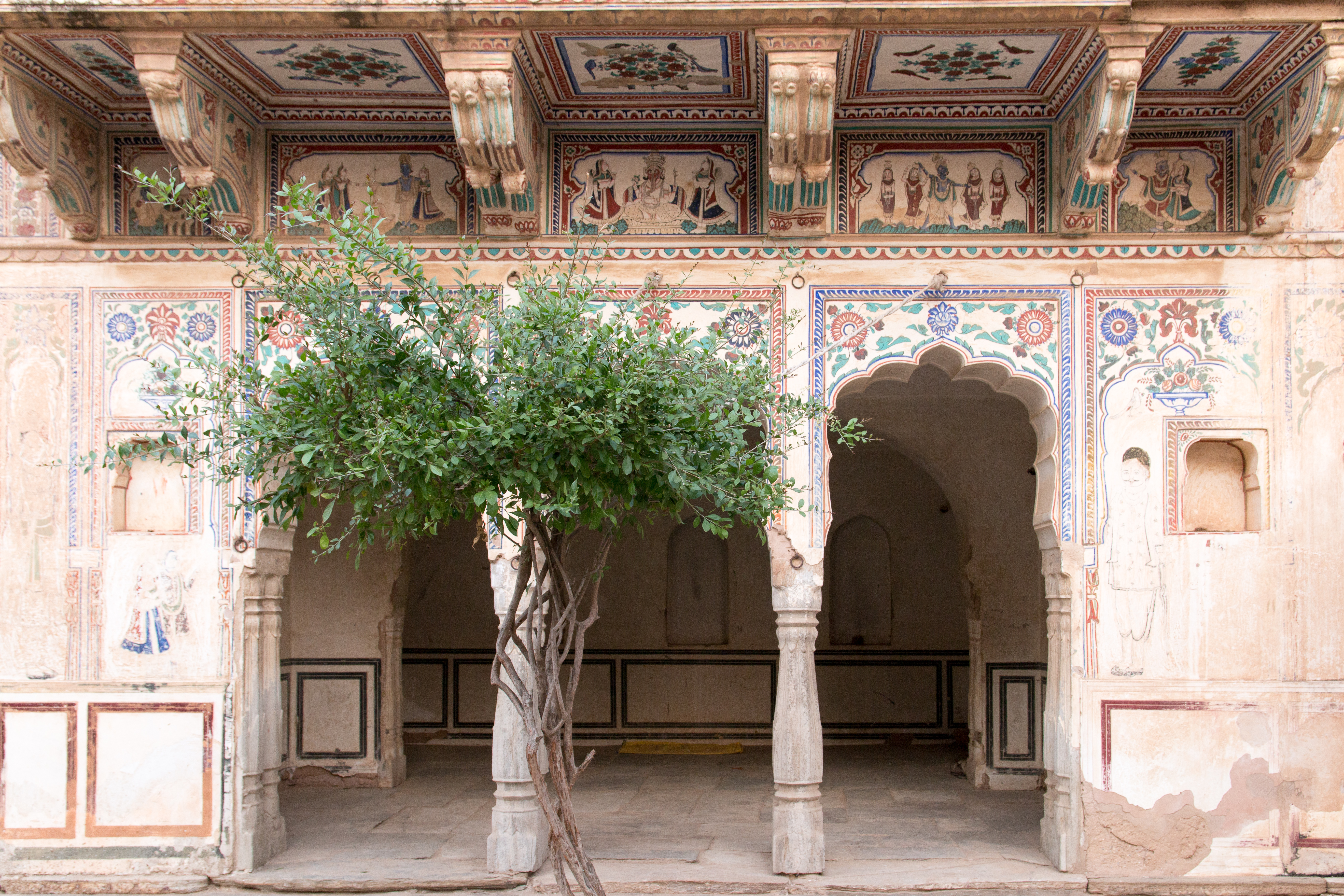 Retreat.